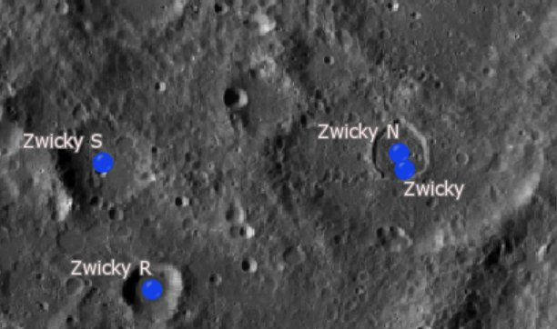 Cráter lunar Zwicky. Cráteres satélite. (Imagen LRO)